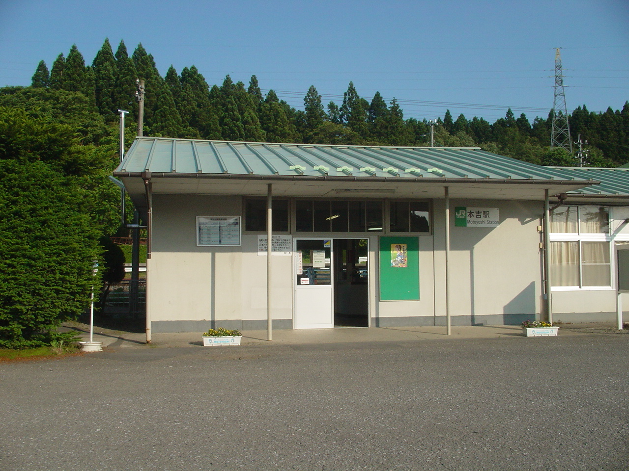 （本吉駅）